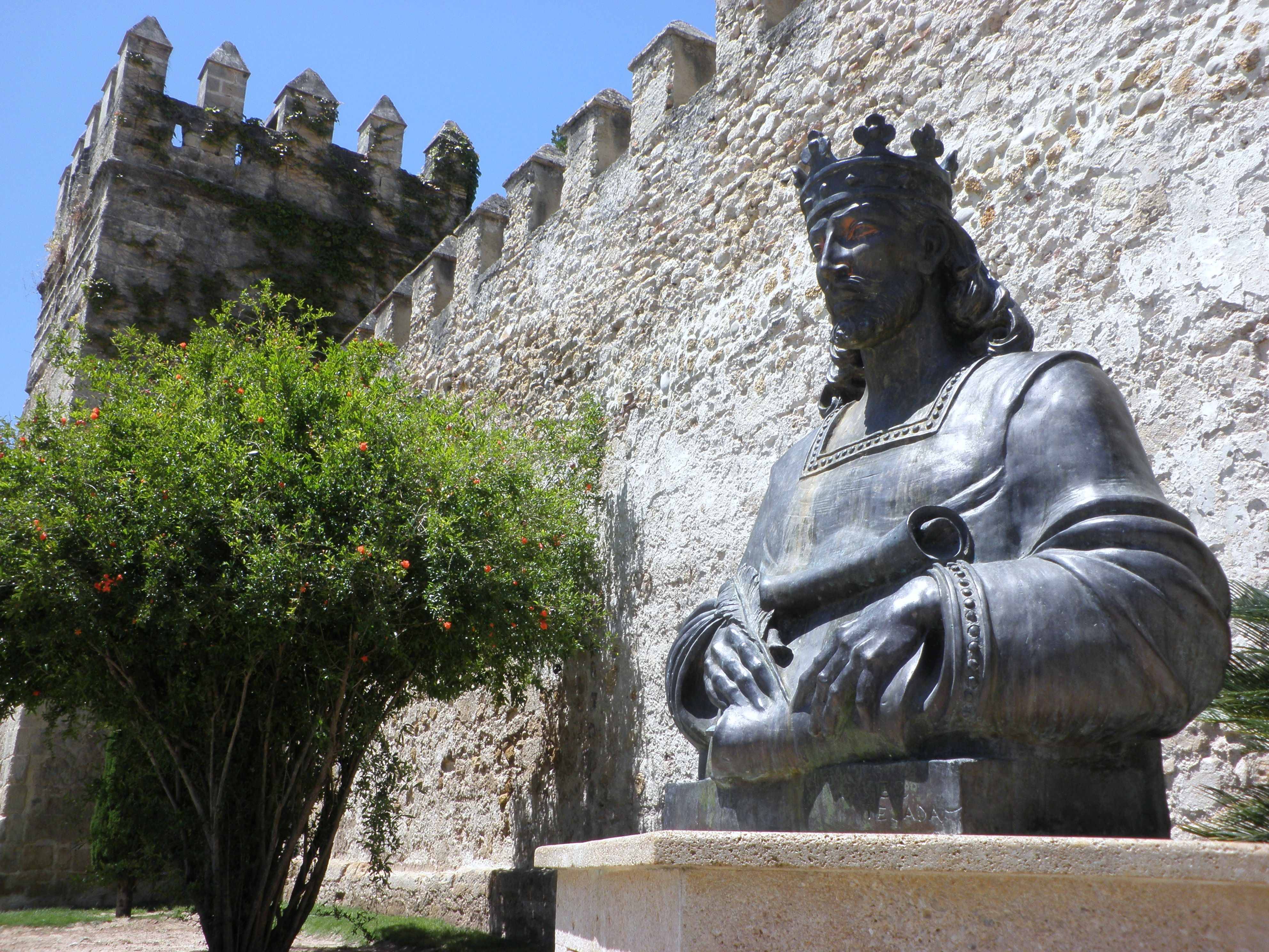 Estatua de Alfonso X El Sabio junto al Castillo de San Marcos